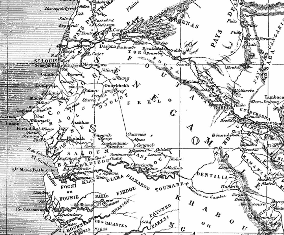 Extrait de la "Carte du voyage de Mr Mage de St-Louis à Ségou. Sénégambie.Niger", dans Voyage dans le Soudan occidental, p. 8 (Le Tour du monde : nouveau journal des voyages, sous la direction de Edouard Charton)